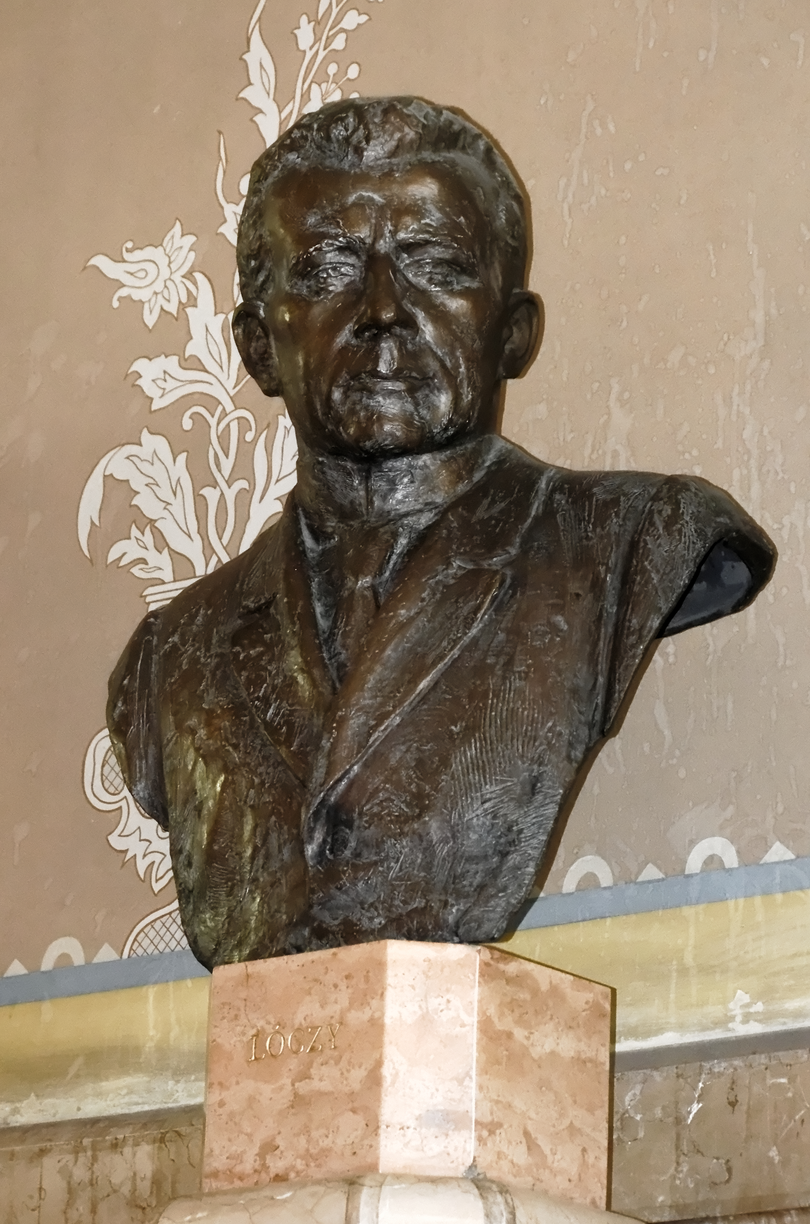 Buste du géologue Lóczy Lajos dans le hall d'entrée de l'Institut d'État hongrois de géologie (Földtani Intézet MÁFI), Stefánia út 14, Budapest.